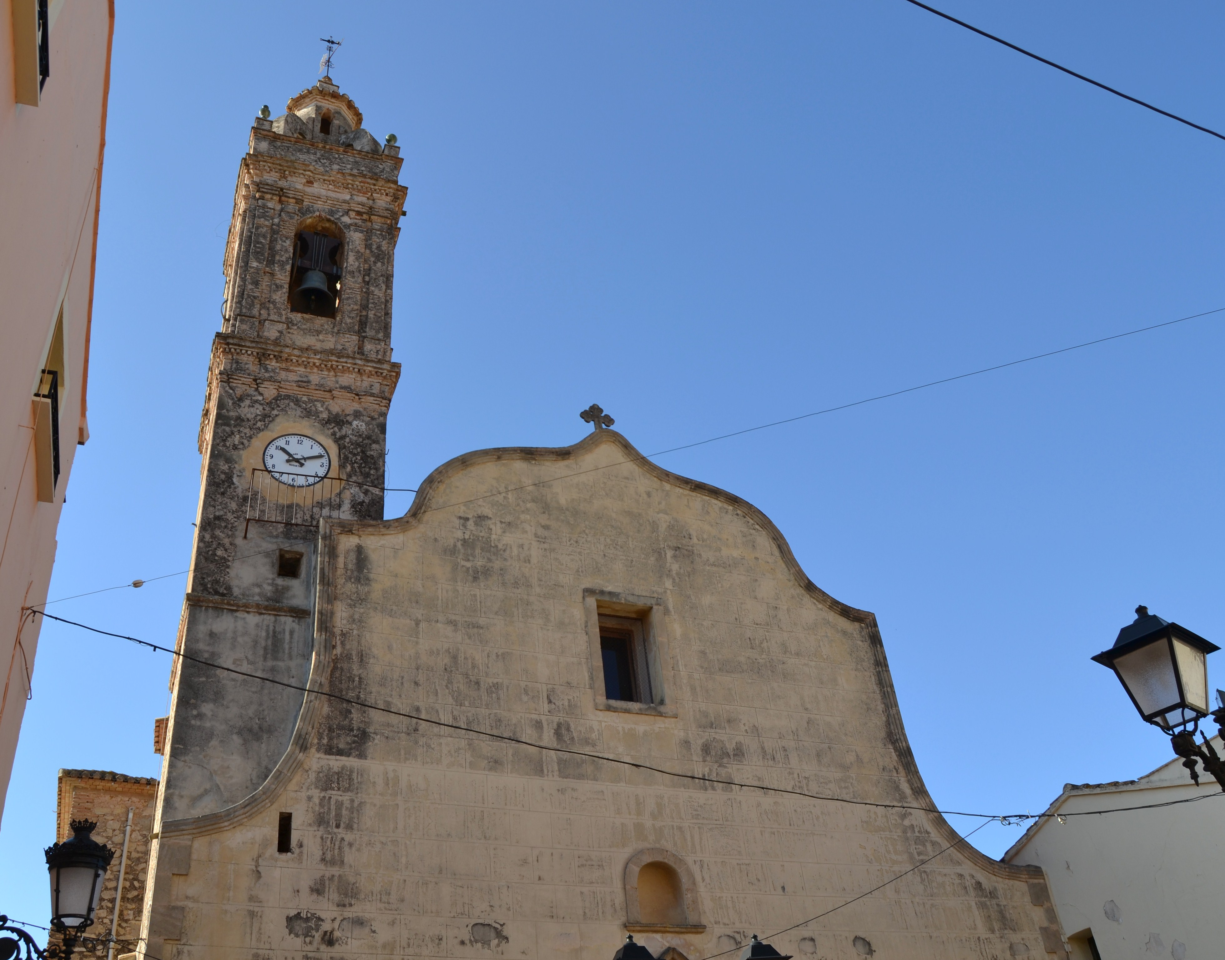 Alcalalí, església de la Nativitat de Maria. 30.006-004.